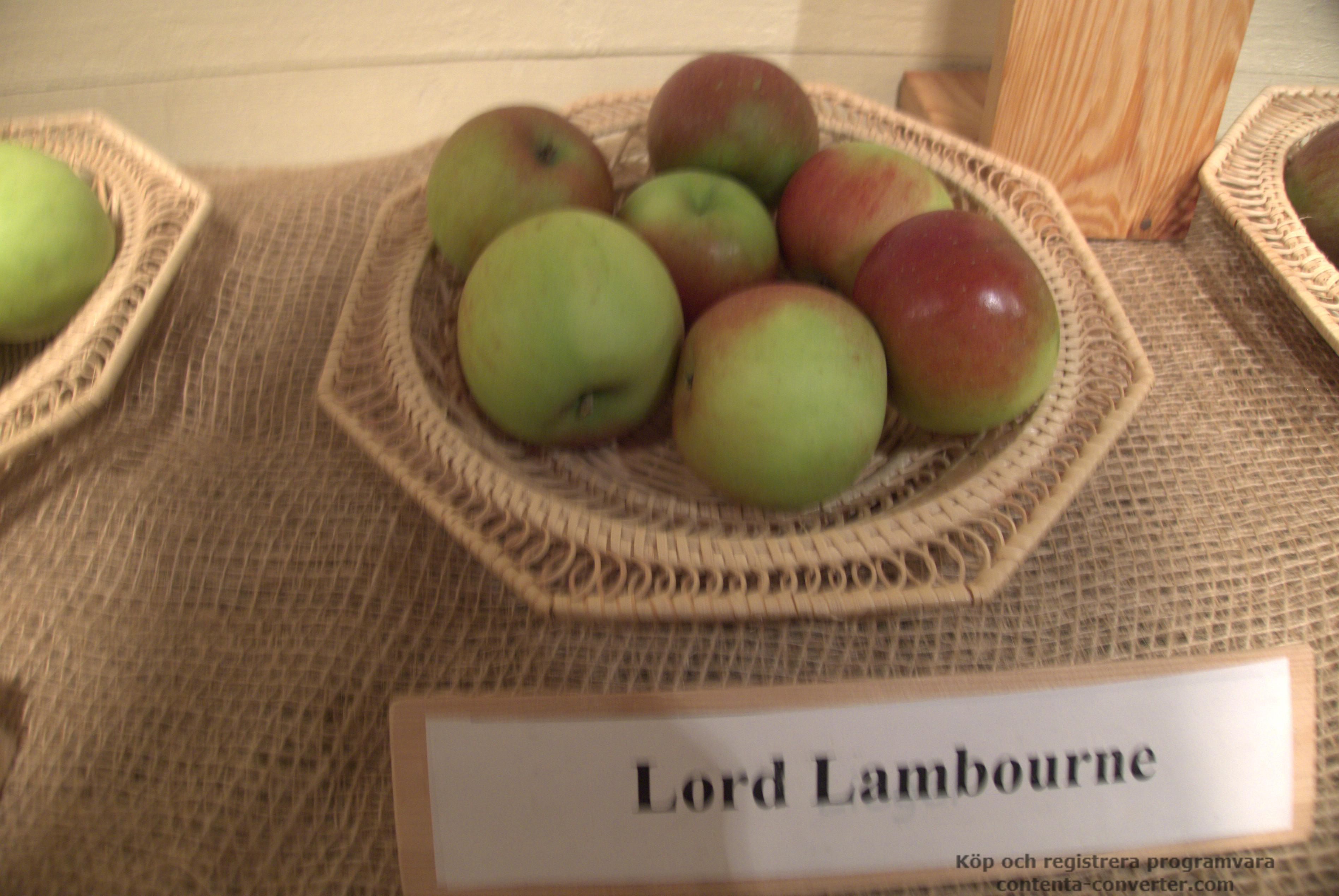 Äpplen av sorten